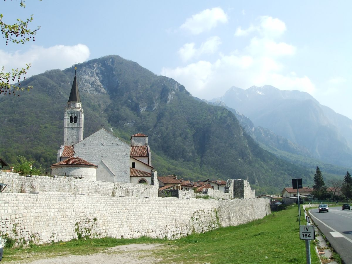 Sebi1, Venzone - La cinta muraria